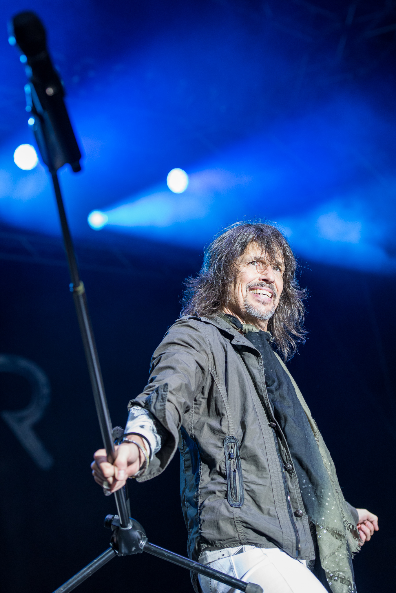 Brombachsee,Concertbüro Franken,Festival,Foreigner,Kelly Hansen,Konzert,Lieder am See,Livekonzert,Livemusik,Musik